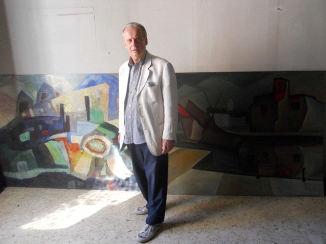 Il compositore e pittore Gaetano Giani Luporini di fronte ad un proprio dipinto.